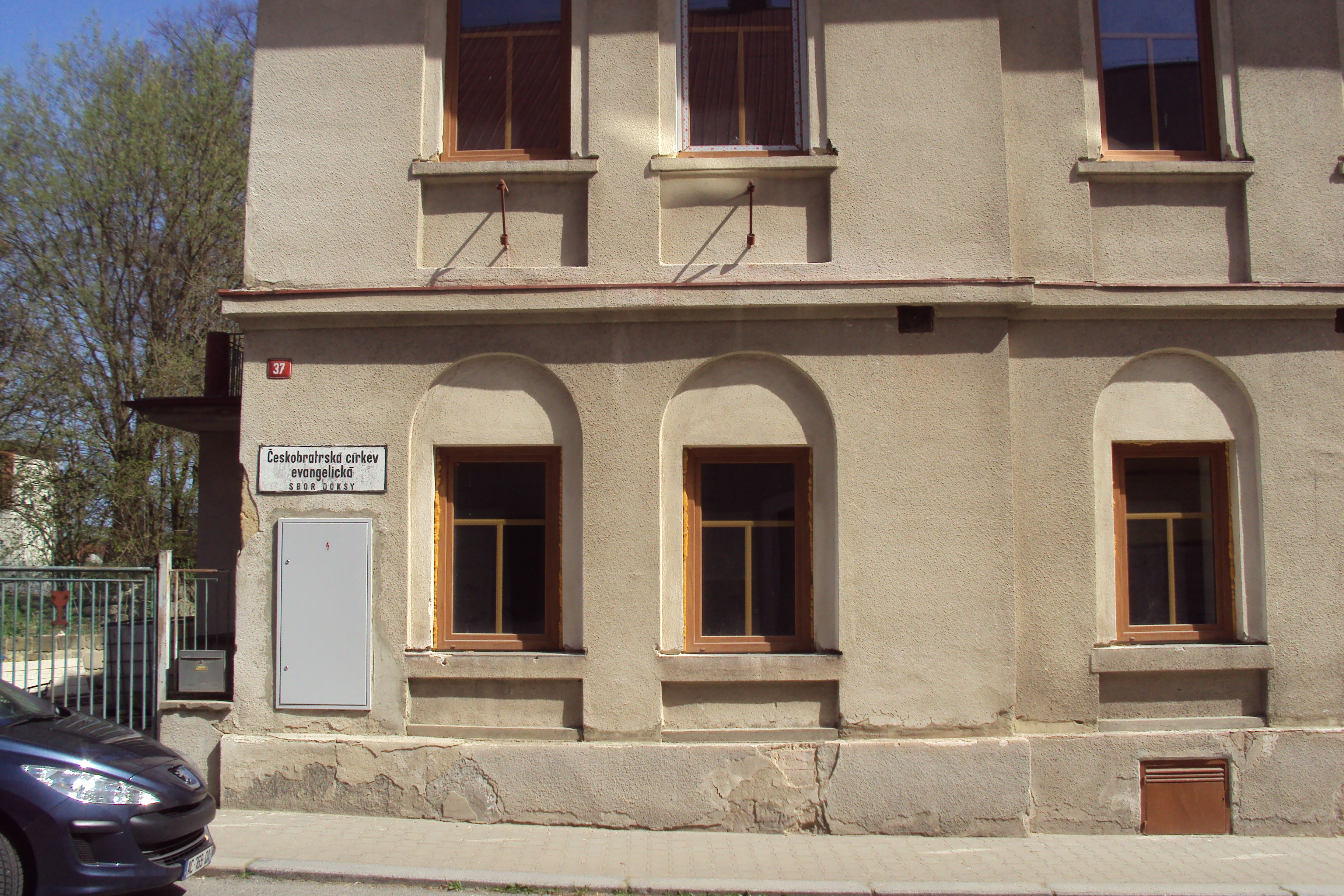 Fara - Sbor evangelíků v sousedství kostela sv. Bartoloměje v Doksech. Farní sbor je od 1. července 2006 kazatelskou stanicí Farního sboru Českobratrské církve evangelické v České Lípě